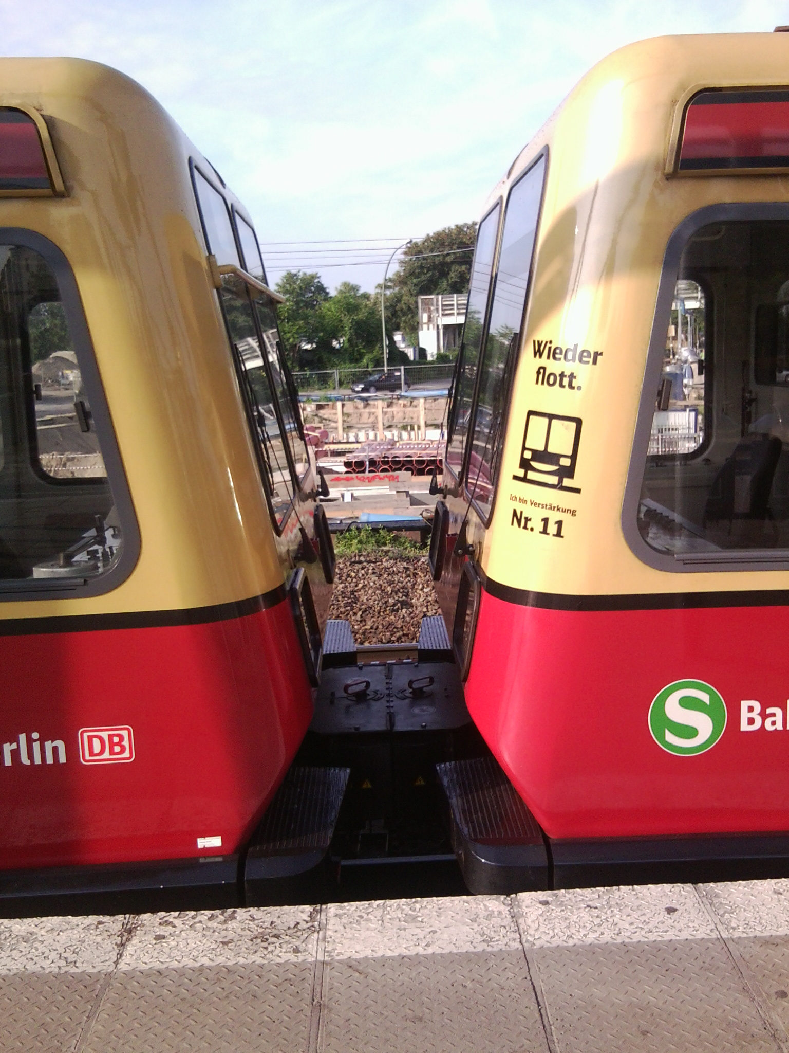 Reaktivierter Berliner S-Bahn Triebkopf der Baureihe 485 (links) in einem Vollzug nach Erkner am Bahnhof Ostkreuz.